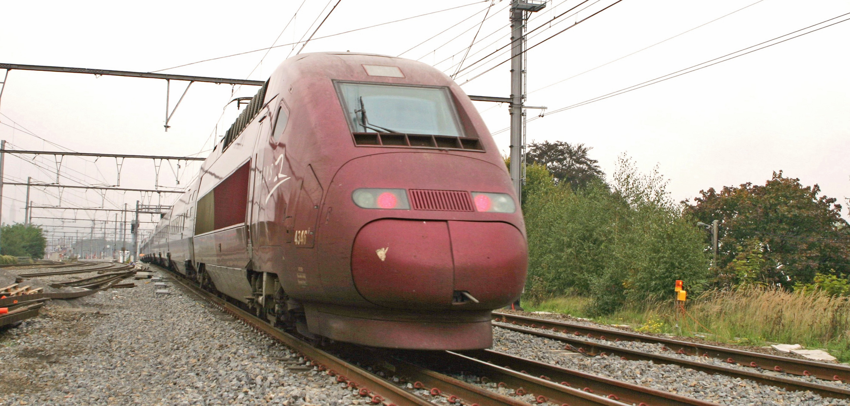 Den Thalis op der Streck